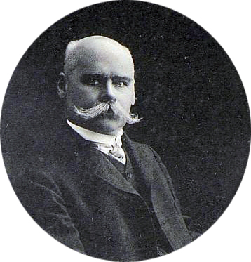 Иванов Николай Тимофеевич (4 декабря 1861, Ставрополь — август 1913, Ставрополь) — предприниматель и государственный деятель Российской империи, городской голова Ставрополя, член Государственной думы III созыва (1907—1912) от Ставропольской губернии.